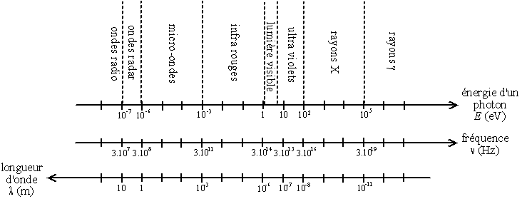 Classification des ondes électromagnétiques en fonction de leur longueur d'onde, de leur fréquence ou de l'énergie des photons